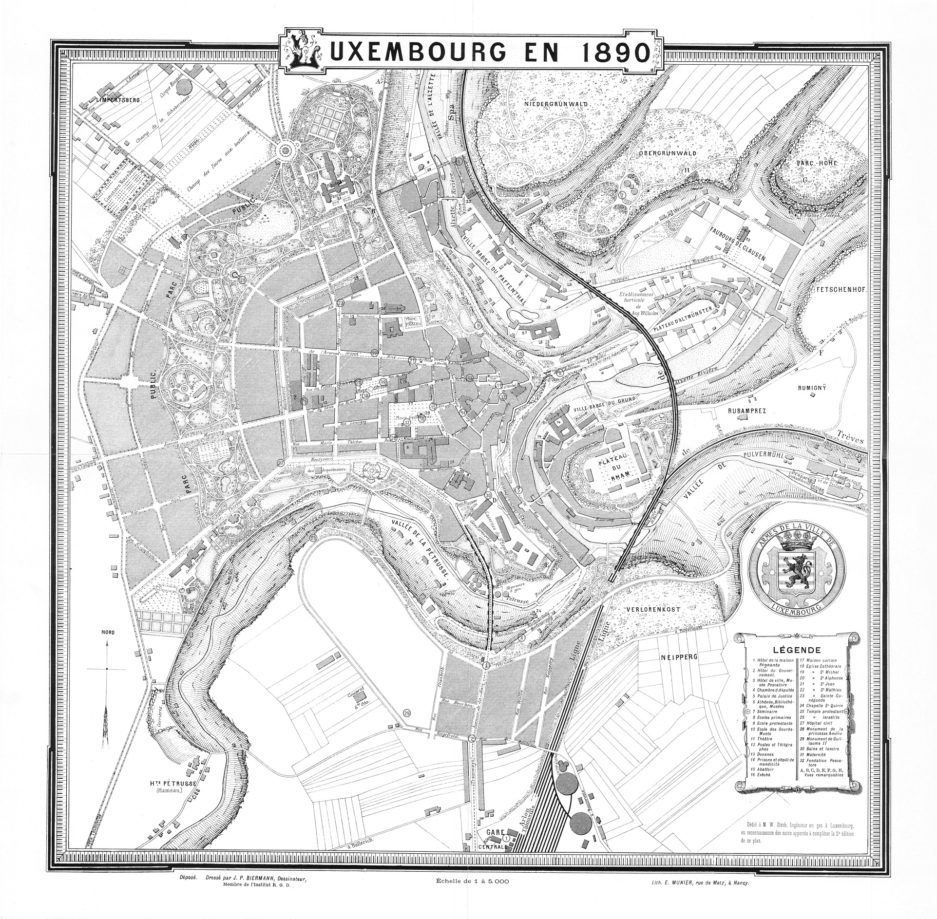 Plang Stad Lëtzebuerg vum Jean-Pierre Biermann. Opgepasst: déi agekreesten Zuelen um Plang stëmmen net mat deene vun der Legend zesummen. D'Zuelen vun der Legend entsprieche just deenen einfache klengen Zuelen um Plang, déi méi schlecht ze gesi sinn.